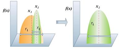 Ejemplo de fusión de dos especies en UEGO.